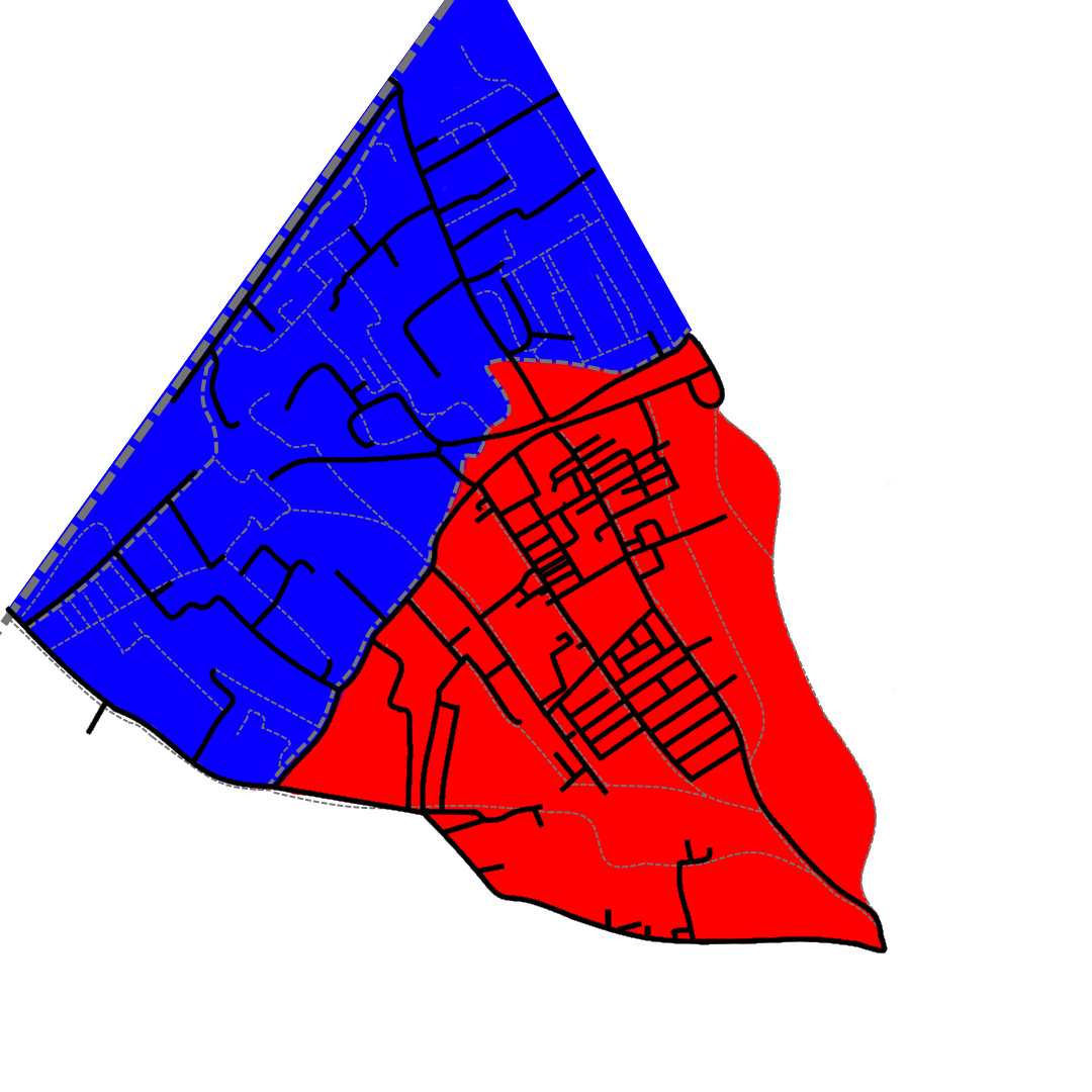 Mapa zonas san jose de la vega